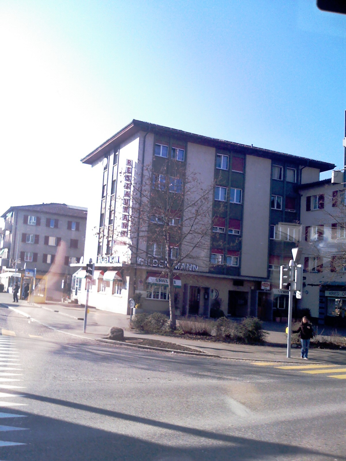 Kloten Wildmann